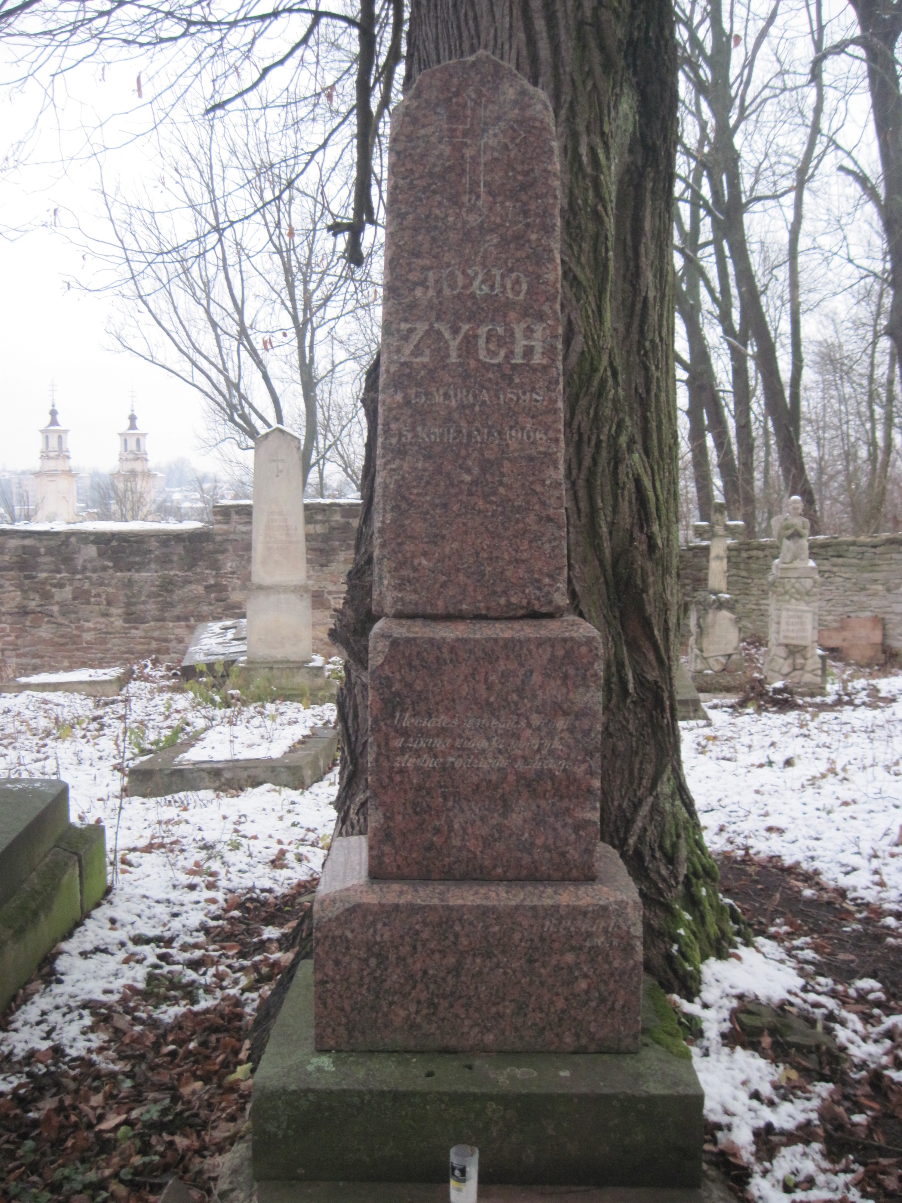 Могила Йозя Зиха (ймовірно, сина директора Бучацької гімназії Францішека Зиха і брата польського геолога Владислава Зиха), Бучач.